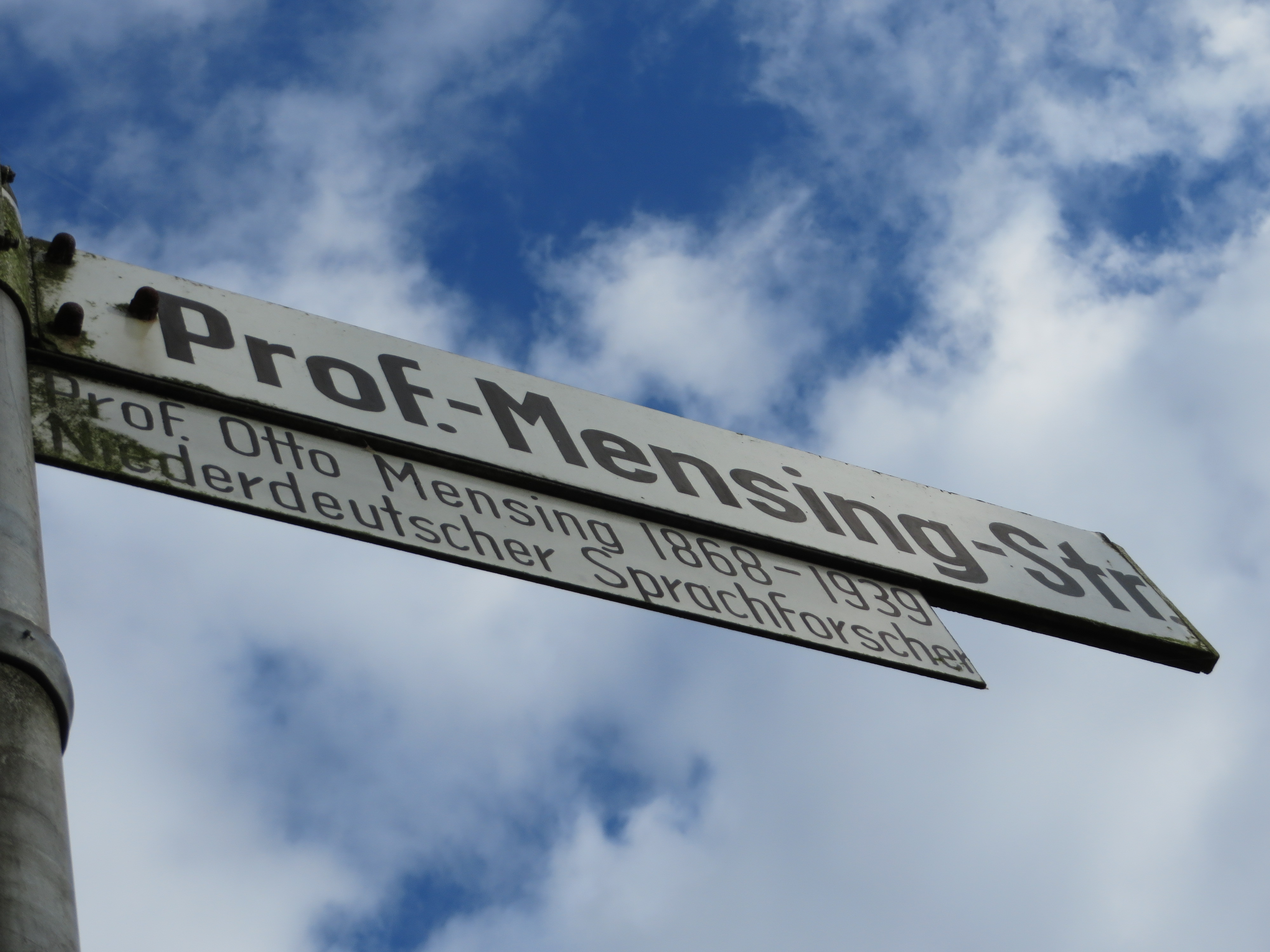 Schild Prof.-Mensing-Straße (Straße benannt nach Otto Mensing), Flensburg 2014, Bild 002